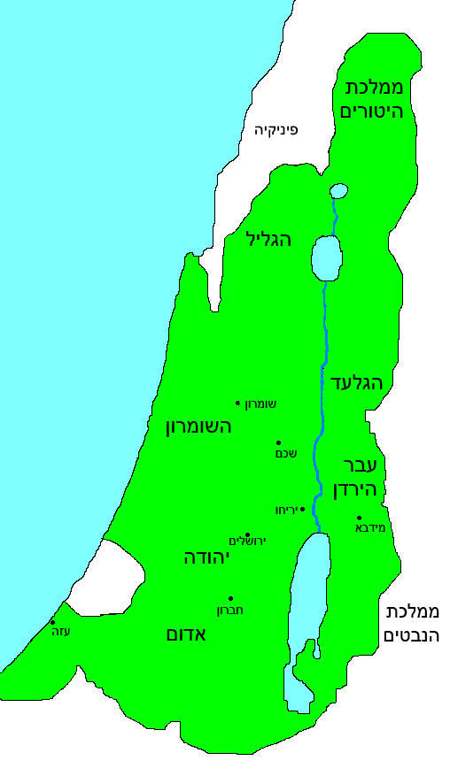 Categorie:Kaart Categorie:Afbeelding oudheid (Original text : Rijk van de Hasmoneeën)